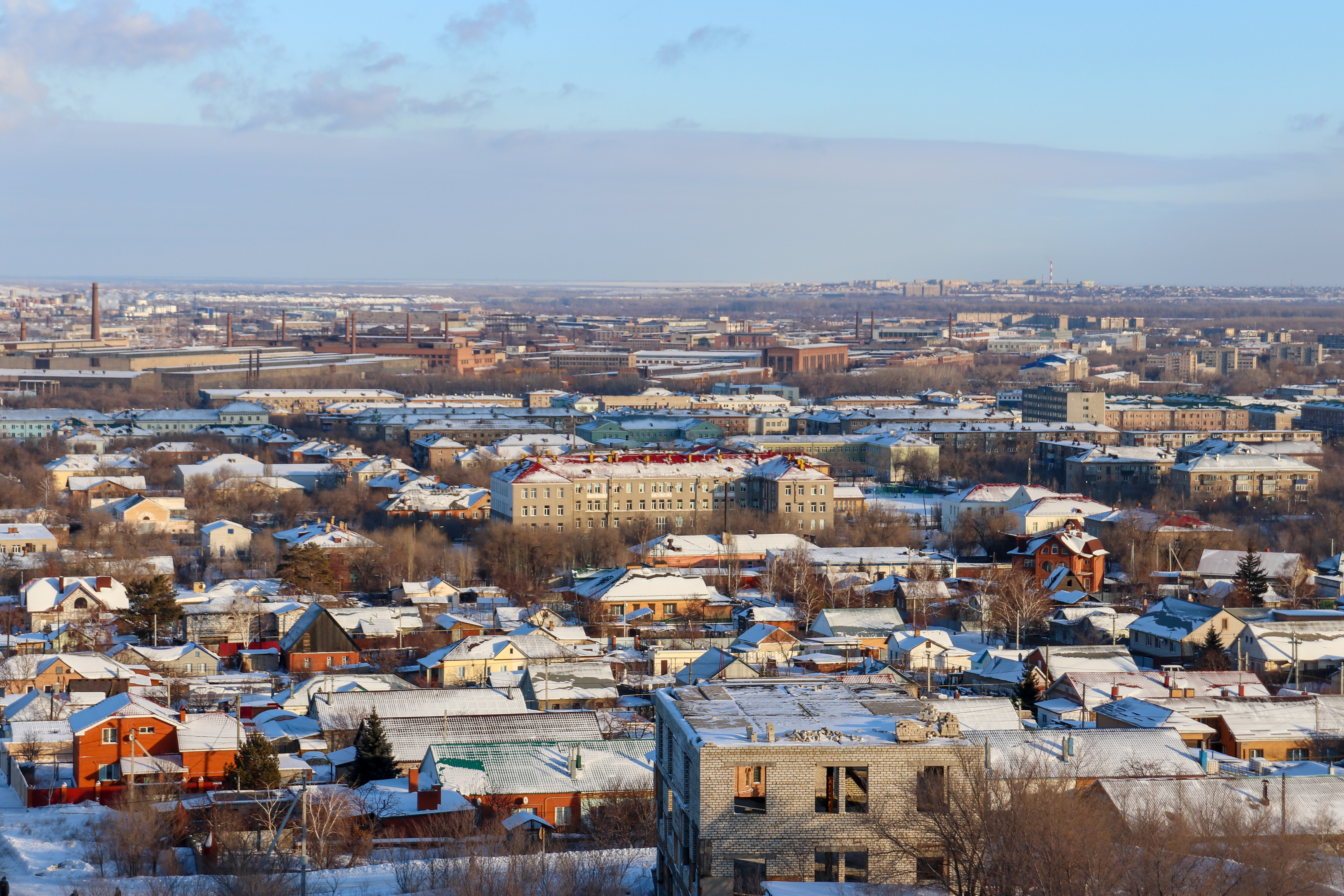 Вид на Орск со смотровой площадки